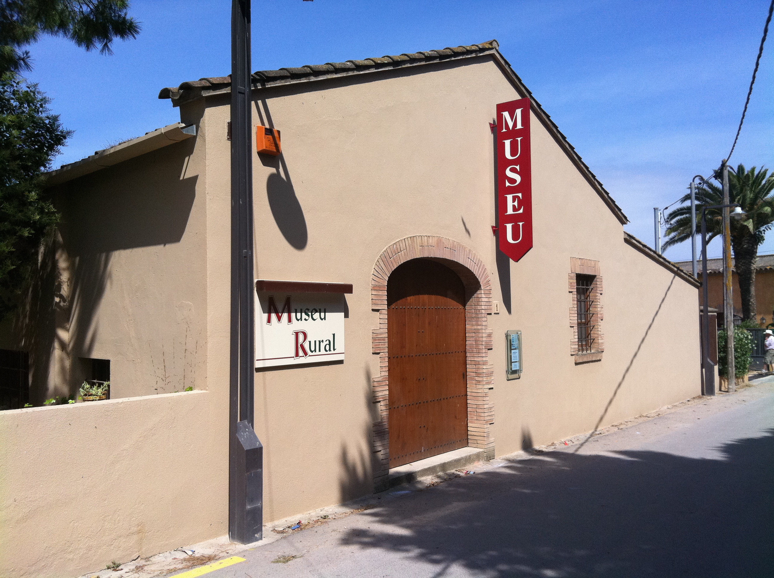 Palau-Sator - Museu Rural.